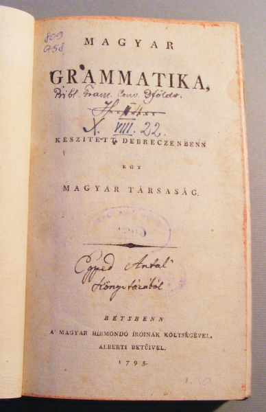 A Debreceni Grammatika címlapja. Görög és Kerekes a Hadi és Más Nevezetes Történetek című hírlap legelső számában pályázatot hirdettek egy magyar nyelvű pszichológiai és grammatikai mű elkészítésére.[3] (Más források szerint a grammatikai pályázatot csak 1789. szeptember 25-én hirdették meg.) A pályázat meghirdetése után igyekeztek minél többfelajánlást összegyűjteni a nyertesek jutalmazására. A grammatikai pályázatot Szécsényi Ferenc és Nunkovics György összesen 50 aranyforinttal támogatta. Az első magyar grammatikai tudományos mű elkészülése több évet vett igénybe. Végül 1795-ig összesen négy pályamű érkezett be Görögékhez, és egy megkésett pályamű, amelyet végül szintén elfogadtak a bírálók. A szerzők között találjuk a Hajdú kerület városainak orvosát, Földi Jánost; egy nemes debreceni tudóst, Veres Mihályt; a Nagyenyeden teológiát oktató Benkő Lászlót; gróf Bethlen Gergely orvosát, Gyarmathy Sámuelt és végül az elkésett pályázat szerzőjét, egy gyulafehérvári papot, Kerestaly Ignácot. Az öt beküldött pályaművet bírálatra elküldték a Nagyenyedi református kollégium tanárainak, illetve a debreceni professzoroknak. Ez utóbbiak úgy vélték, hogy mind az öt pályamű kiváló szakmunka, ezért ők azt kérték Görögéktől, hogy egybeszerkeszthessék és néhol kiegészíthessék az eredeti műveket. Így jött létre az első magyar nyelvtankönyv: a Debreceni Grammatika, amely mind a mai napig fontos alapja a magyar nyelv oktatásának. A Magyar Hírmondó tehát a Debreceni Grammatikát jelentette meg, de a pályázat nyertesei között a debreceni professzorok nem akartak ott lenni. Ezért a pályázat nyertesének Földi Jánost hirdették meg, akinek a művéből a legnagyobb részt vették át a Debreceni Grammatika megalkotásánál. Görögék úgy döntöttek, hogy Földit 26 aranyforinttal jutalmazzák meg, a fennmaradó összeget pedig a többi négy pályázó között egyenlően osztják el.[35] A grammatika országszerte nagy sikert aratott, bár Kazinczynak és körének egyáltalán nem tetszett a mű rendszerezése és elvei.